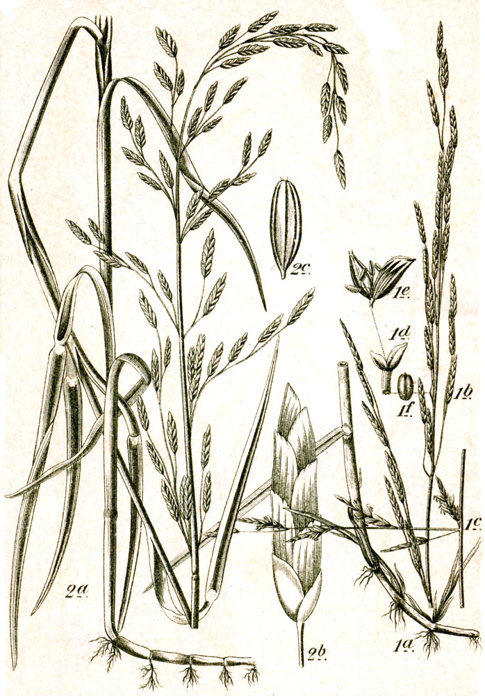 1: Glyceria fluitans (L.) R. Br. 2: Glyceria notata Chevall., syn. Glyceria plicata (Fr.) Fr. Original Caption 1. Mannagras, Glyceria fluitans R. Br. 2. Faltiges Süssgras, Gl. plicata Fr.